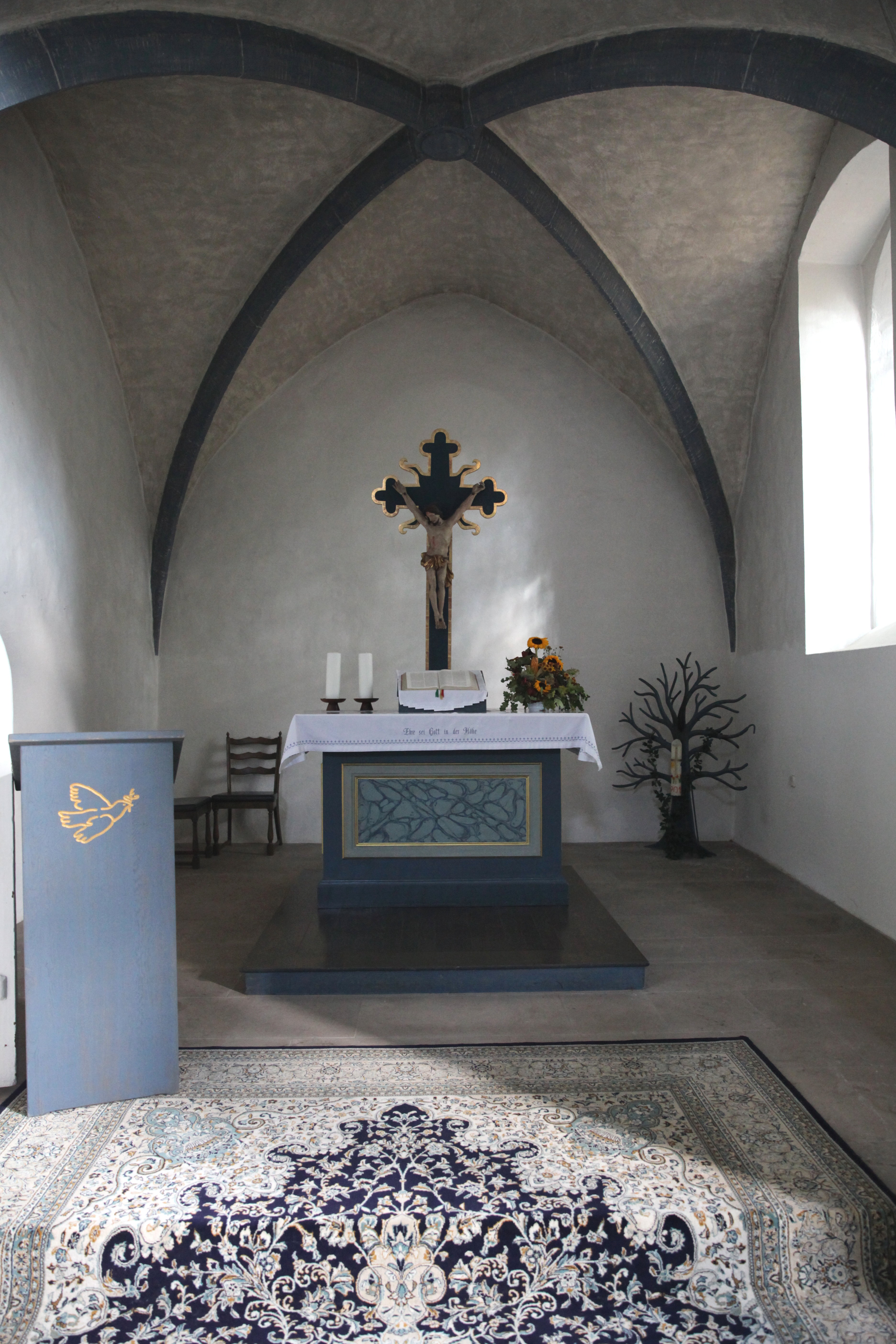 St. Bartholomäus in Ottowind, Meeder